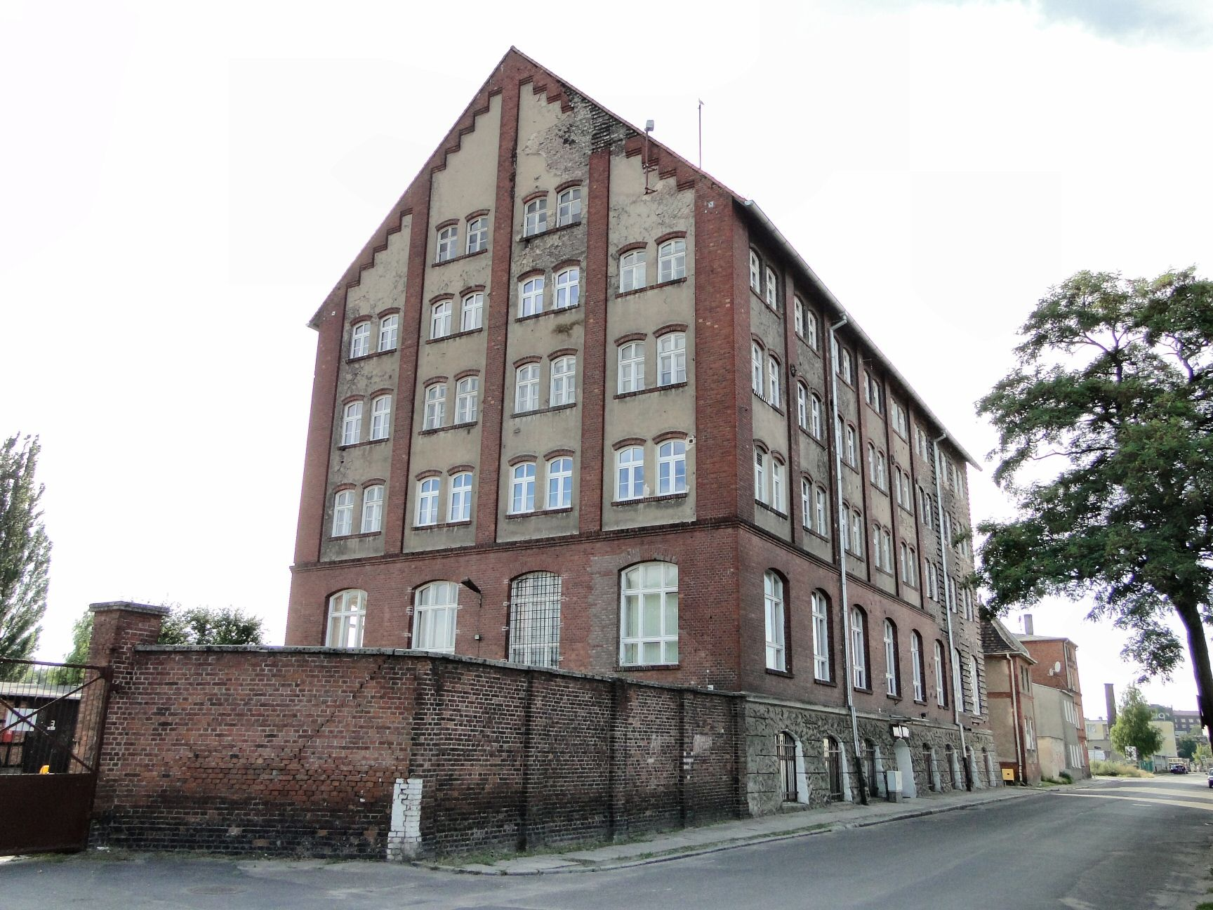 Wojewódzka Stacja Sanitarno - Epidemiologiczna przy ul. Spedytorskiej w Szczecinie.